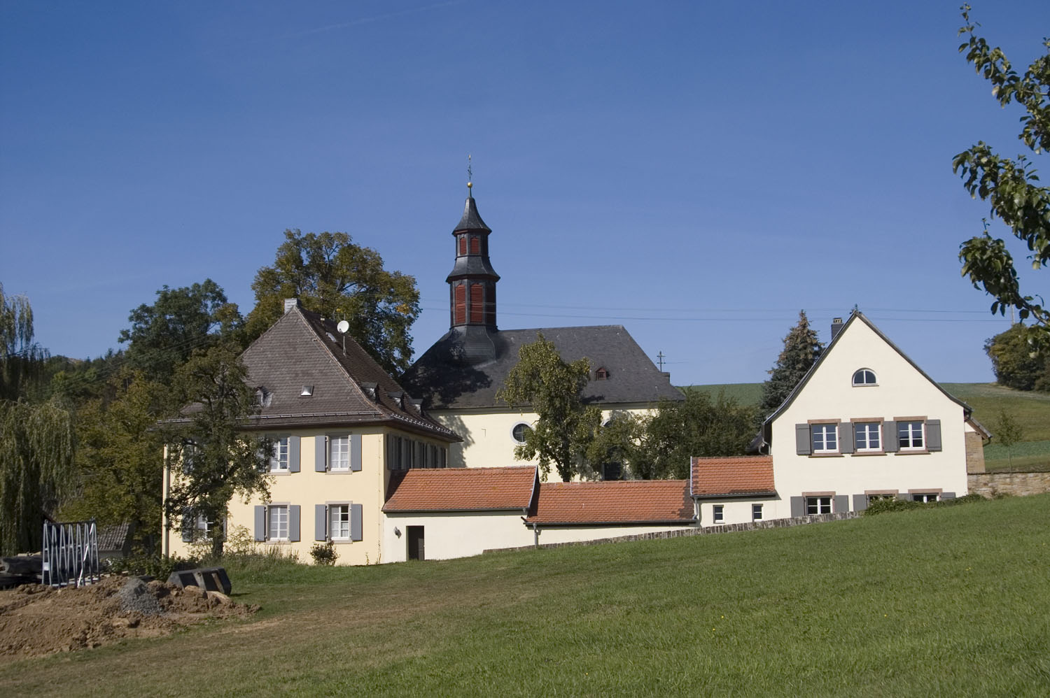 Am Schulberg 7: Protestantische Pfarrkirche; spätbarocker Saalbau mit Walmdach, bezeichnet 1767, Architekt Philipp Heinrich Hellermann, Zweibrücken; Rokoko-Ausstattung, Werkstatt Georg Philipp Schmidt, Meisenheim; ortsbildprägend